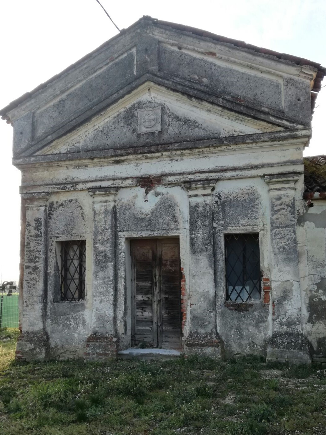 Oratorio